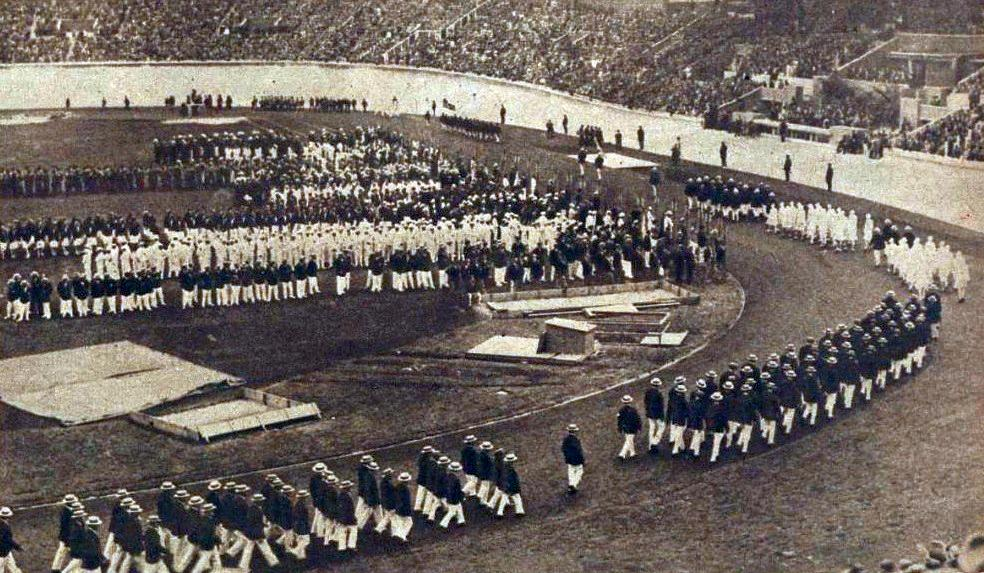 Ouverture des JO de 1928.